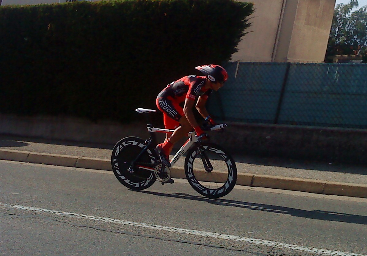 Cole House lors du prologue du Tour de l'Ain 2010